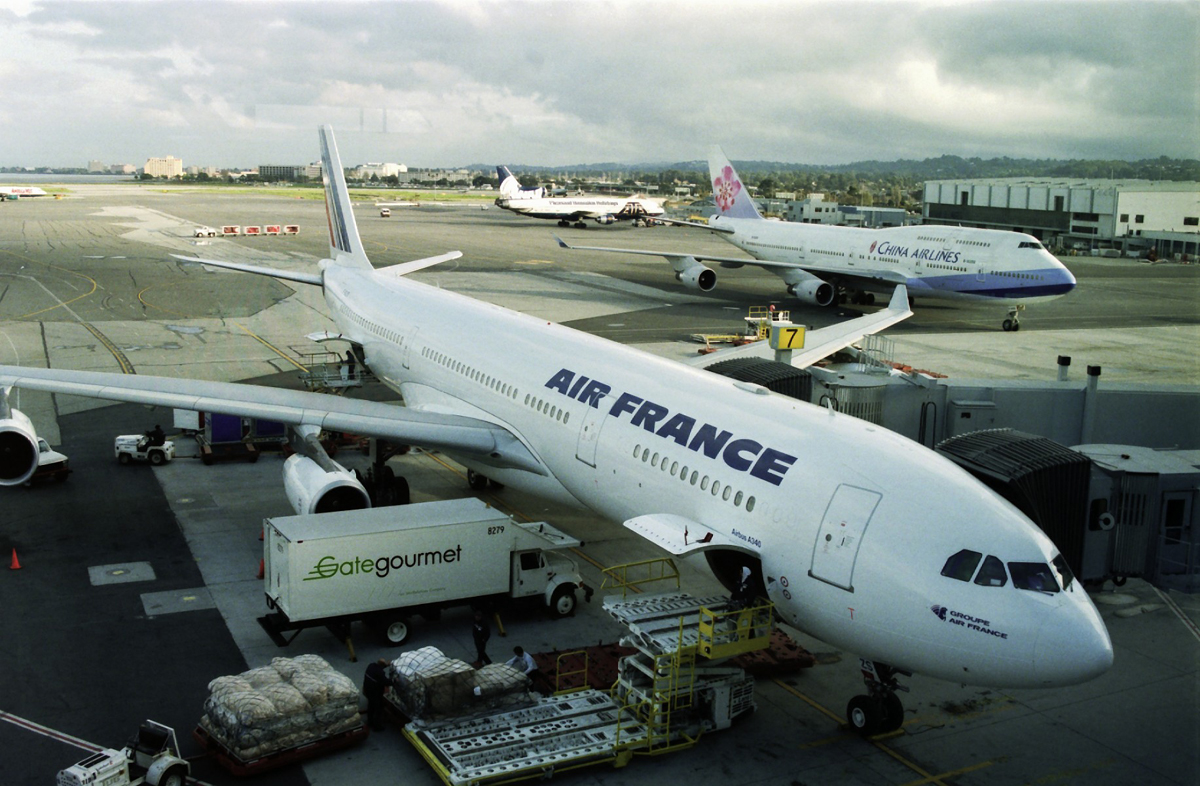 MSN 310 A340-313 X AIR FRANCE SFO